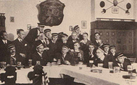 Kneipe des Corps Frankonia Prag mit Karl Hans Strobl.